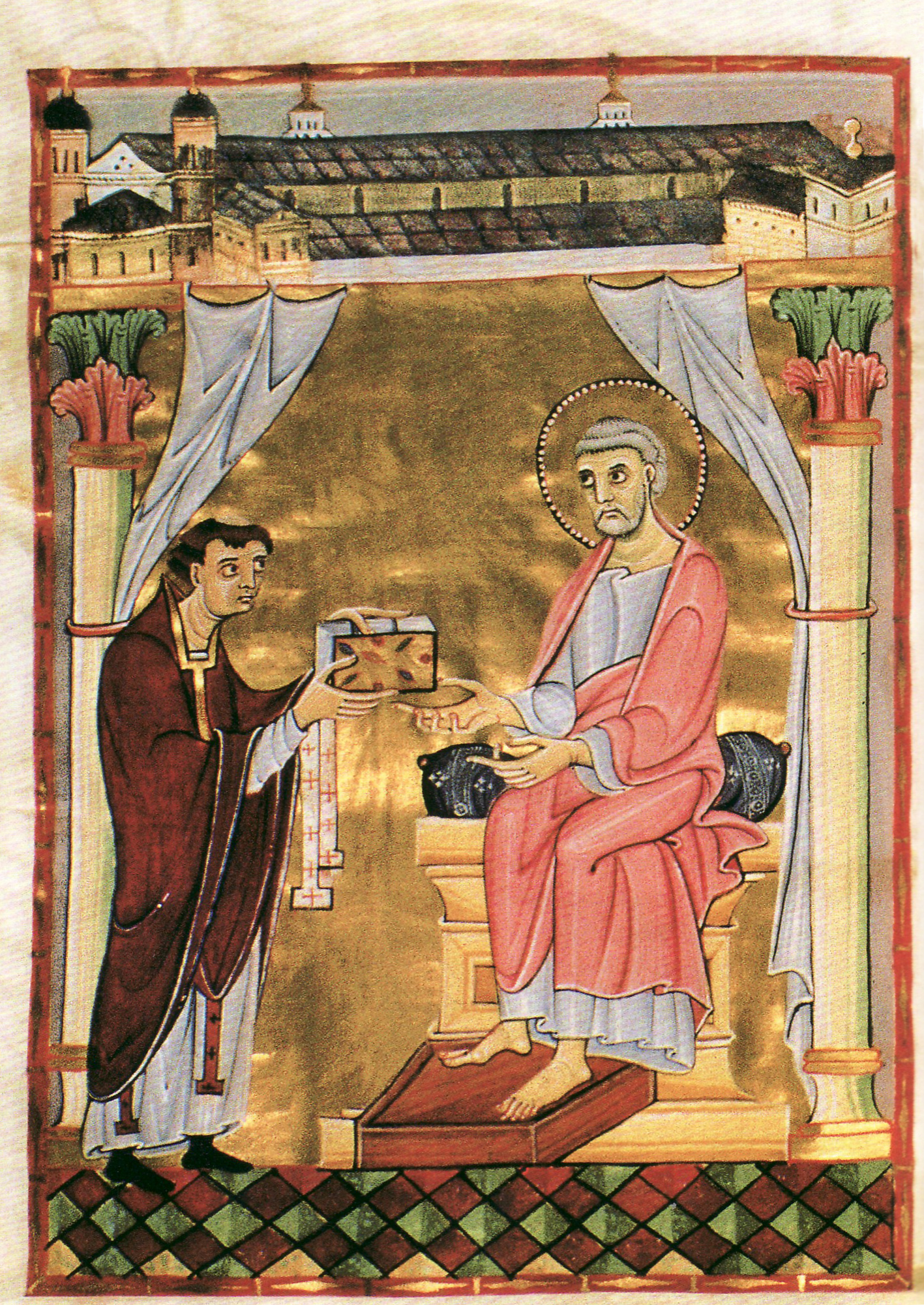 Stifterbild des Hillinus-Codex (fol. 16v, Hs. 12, Dombibliothek Köln): Der Stifter reicht Petrus den Codex